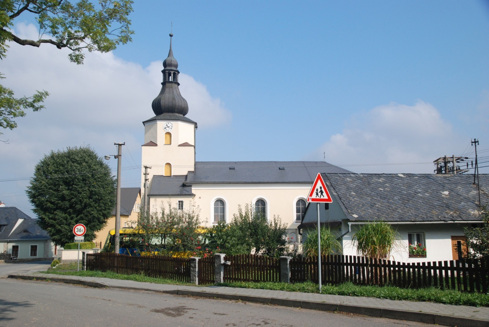 Kostel svatého Vavřince, na hřbitově, Štáblovice.